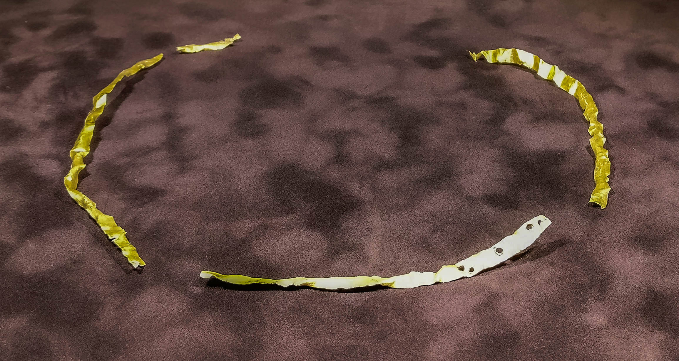 Necklace from Ovçular tepe, the oldest jewelry piece of the South Caucasus. Exhibit at Heydar Aliyev Center, Baku, 2018. The golden necklace of the Eneolithic period was discovered in 2008 near the village of Dize, Sharur district of Nakhchivan Autonomous Republic during archaeological excavations in the ancient settlement location on the Hunters Hill (Ovçular Təpəsi). The necklace is the oldest piece of jewelry found in the South Caucasus. Prior to this discovery, the most ancient gold jewelry piece in the South Caucasus was discovered during excavations in Georgia and was considered an item of early Bronze Age era.